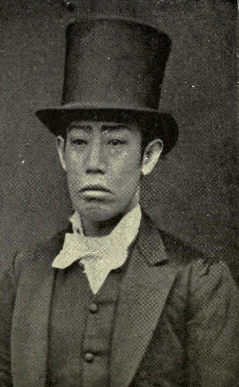 市川團十郎 (9代目)